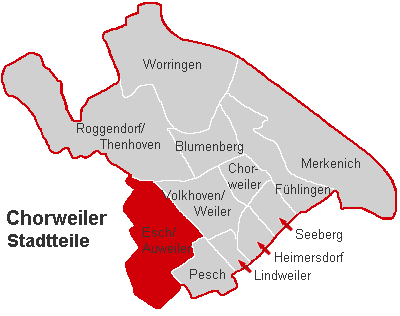 Lagekarte Esch/Auweiler im Stadtbezirk Köln-Chorweiler